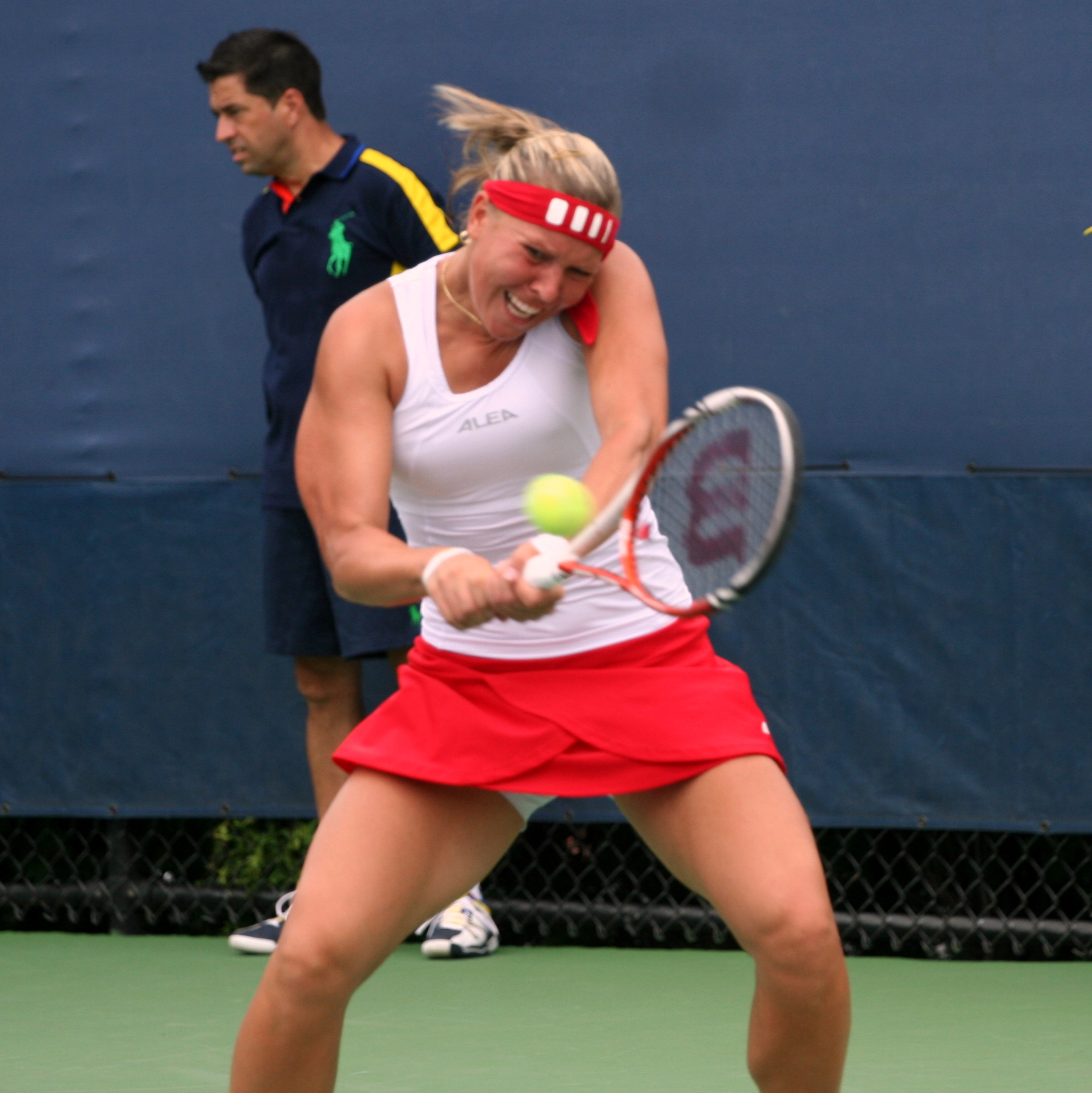 Emiliàn e rumagnòl: La Lucie Hradecká tòlta śò durànt gl'US Open dal 2012